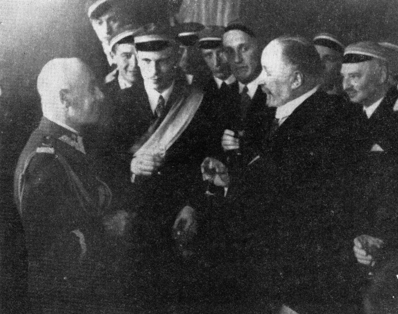 Edward Rydz-Śmigły na spotkaniu z przedstawicielami korporacji studenckiej "Polonia", Wilno 1937 rok.